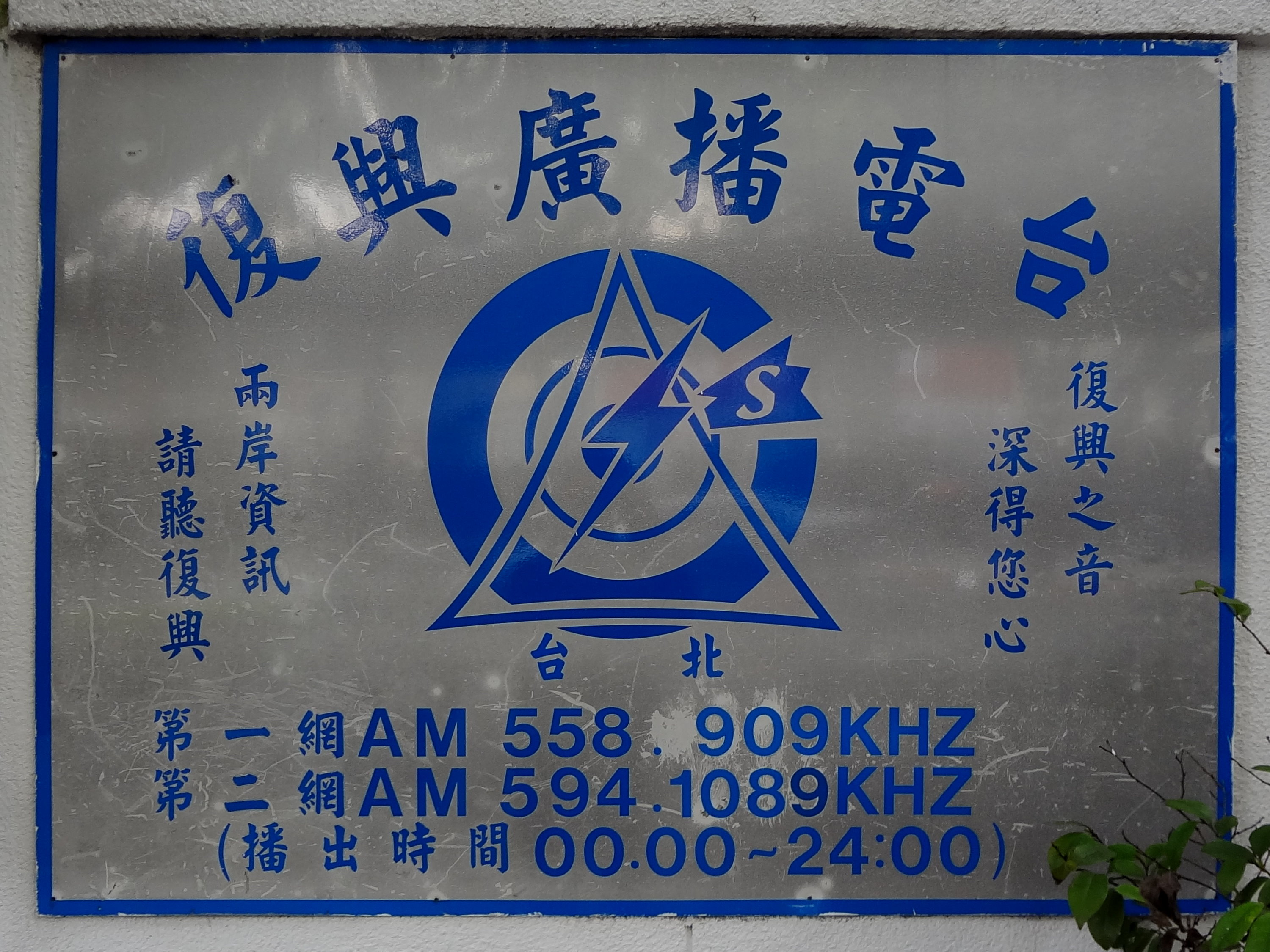 臺北市士林區中山北路五段復興廣播電臺總臺廣告板。